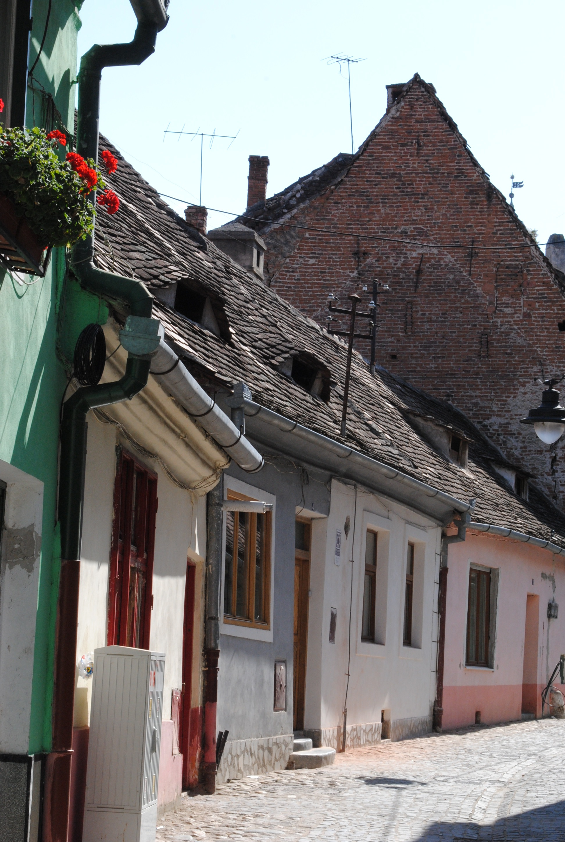 Casă, urme sec. XV - XVI, cca. 1700, 1860